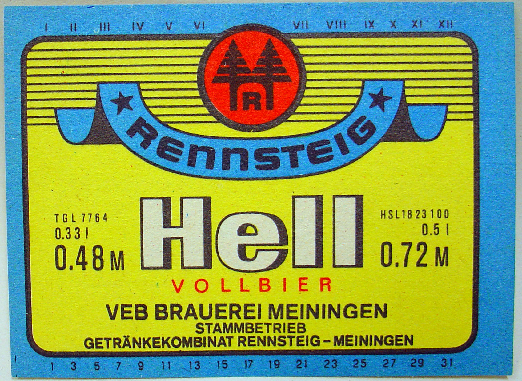 Rennsteig Hell Vollbier, VEB Getränkekombinat Rennsteig/Meiningen, Werk Meiningen, Etikett (DDR)